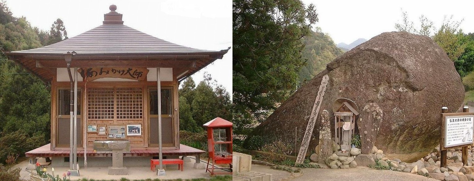 松山市九谷にある網掛石